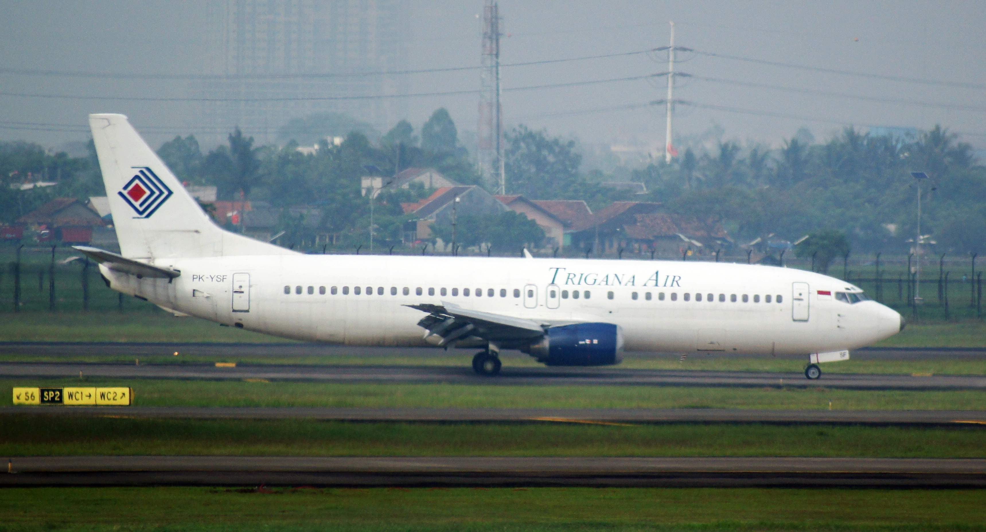 05/12/1998 HL7251 Asiana Airlines 15/12/2003 N869AP GECAS 22/12/2003 PK-YTZ Batavia Air ??/09/2013 PK-YSF Trigana Air